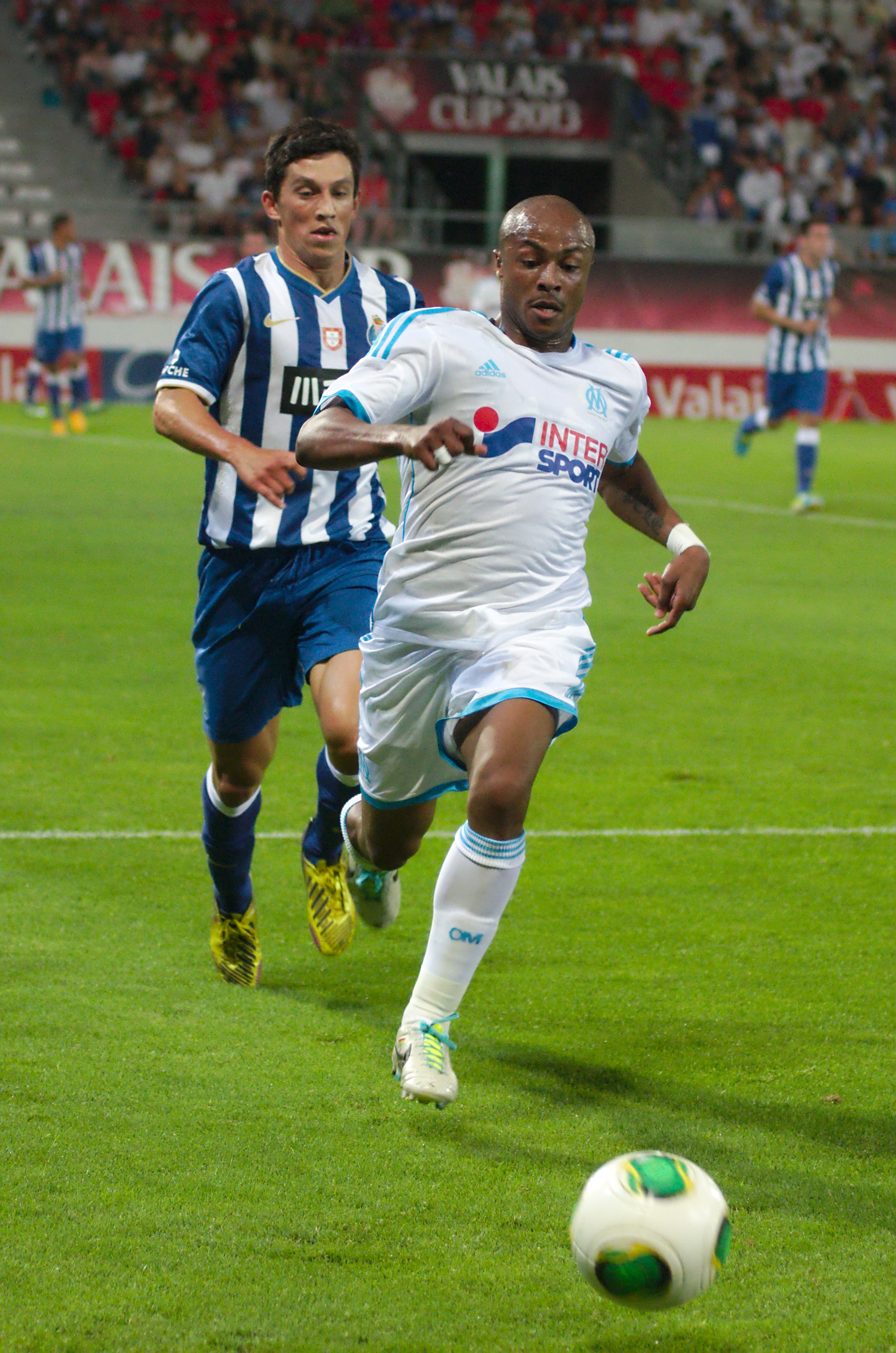 Valais Cup 2013 - OM-FC Porto - 20130713 - André Castro et André Ayew